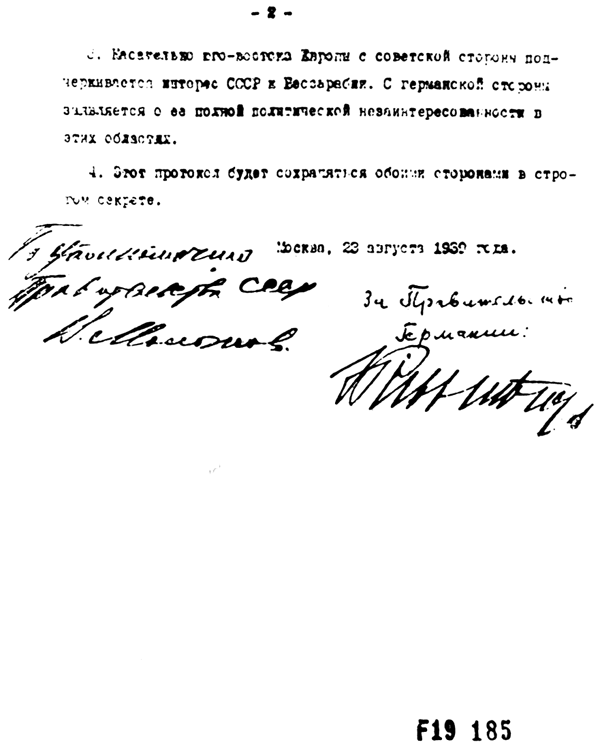 Секретный протокол к договору о ненападении по немецкому микрофильму стр. 2